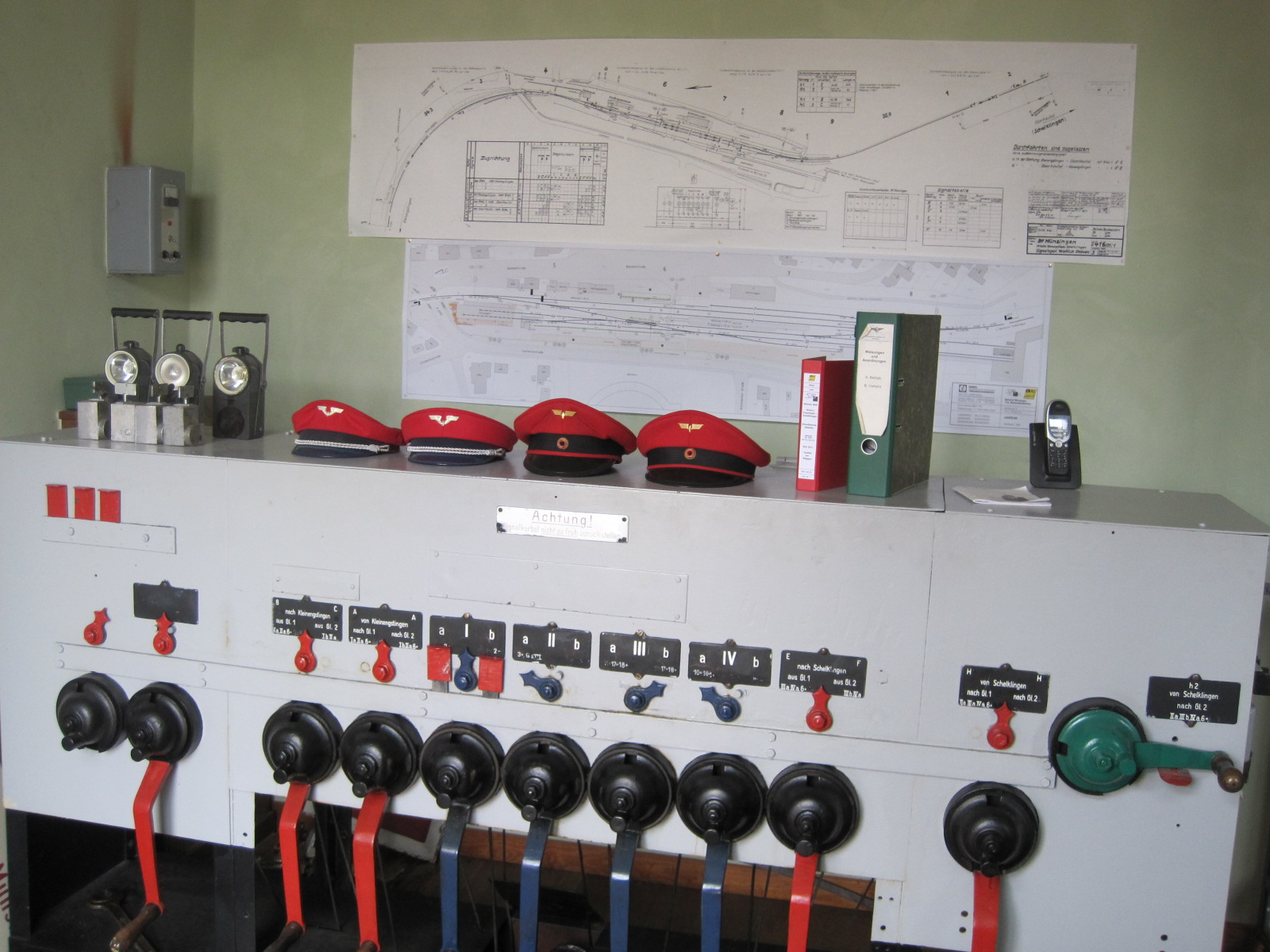 Das noch in Betrieb befindliche Kurbelwerk von 1907 im Bahnhof Münsingen. Die roten Kurbeln sind Signal-, die blauen dagegen Riegelkurbeln, erkennbar an der Bezeichnung mit römischen Ziffern.